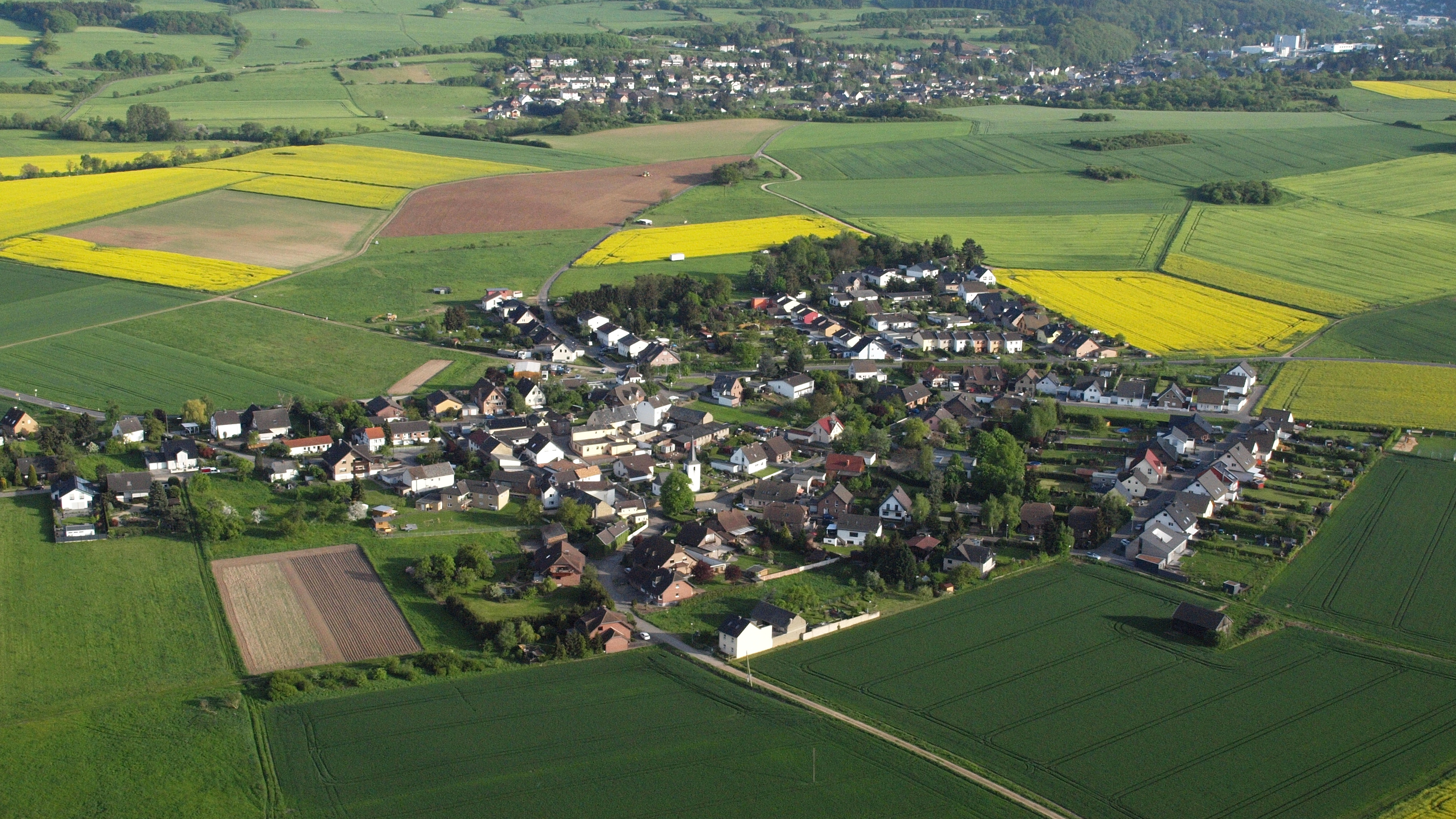 Kalkar, Bad Münstereifel: Luftaufnahme (2015)